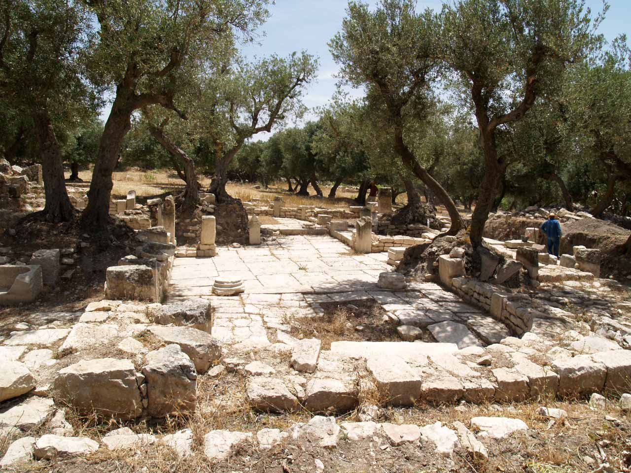 Dougga Oliviers poussant sur les ruines